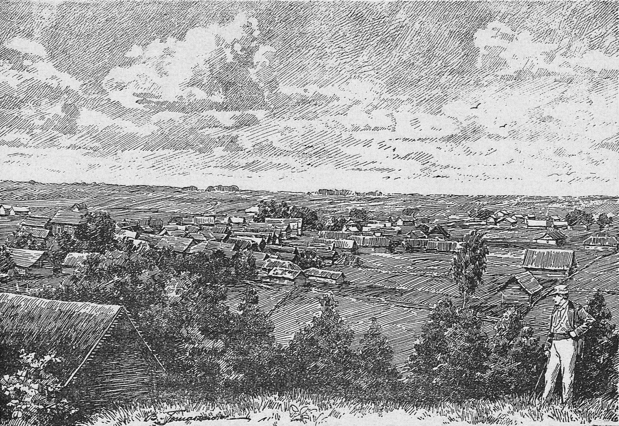 Беларуская (тарашкевіца): Трабы (Traby)